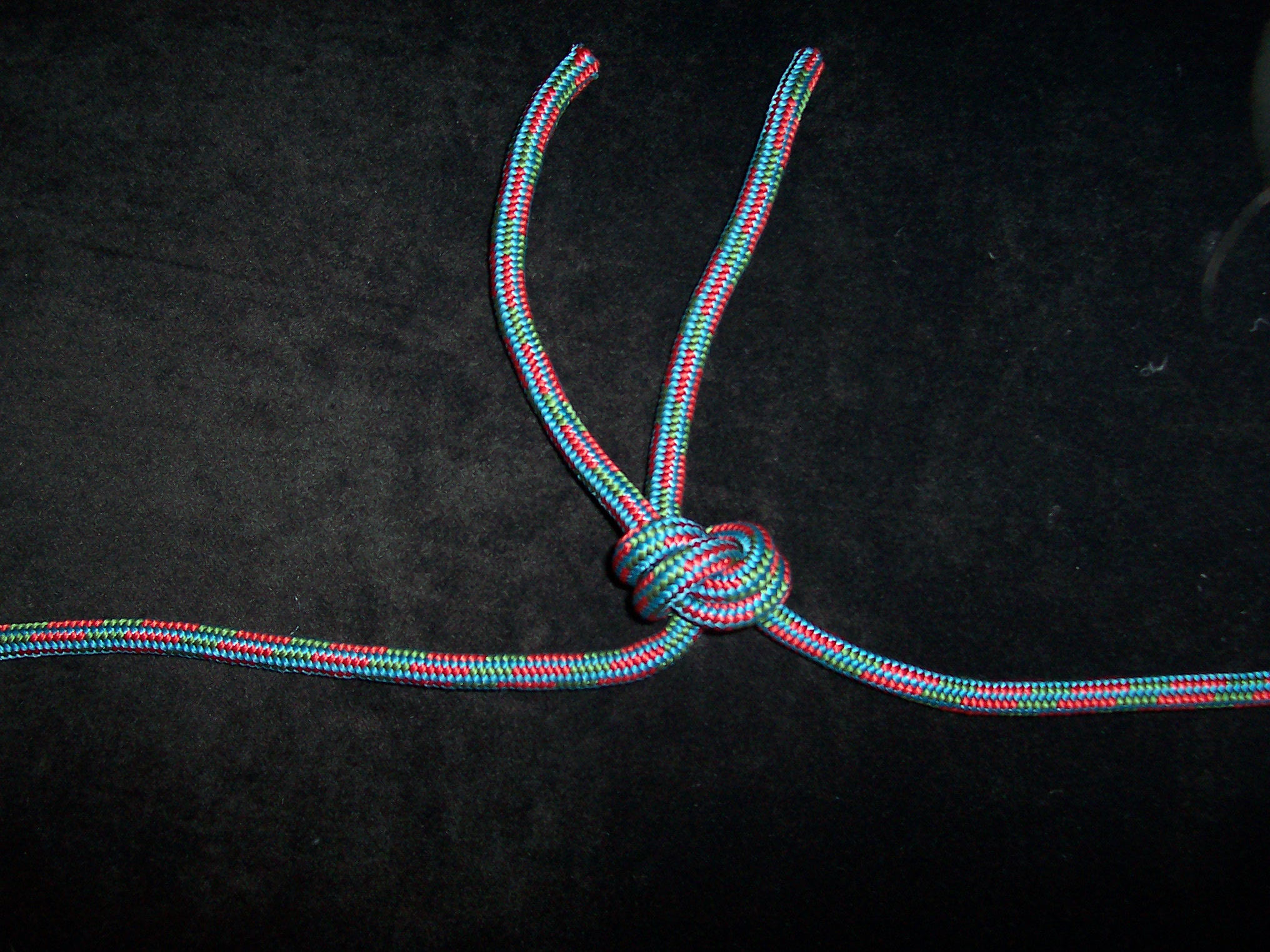 blocker